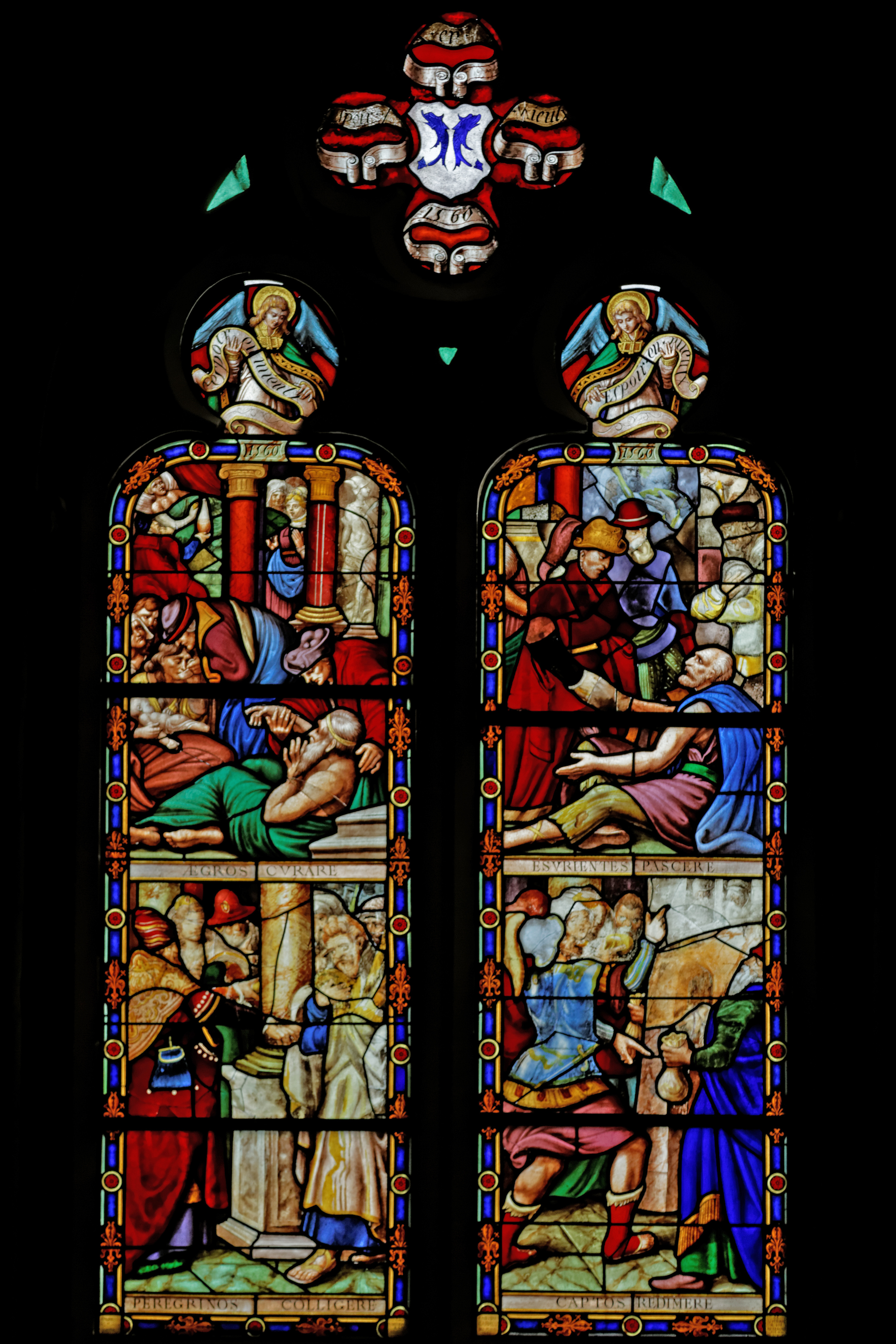 Vitrail représentant les œuvres de miséricorde, 1560, dans la cathédrale Saint-Paul-Aurélien de Saint-Pol-de-Léon.